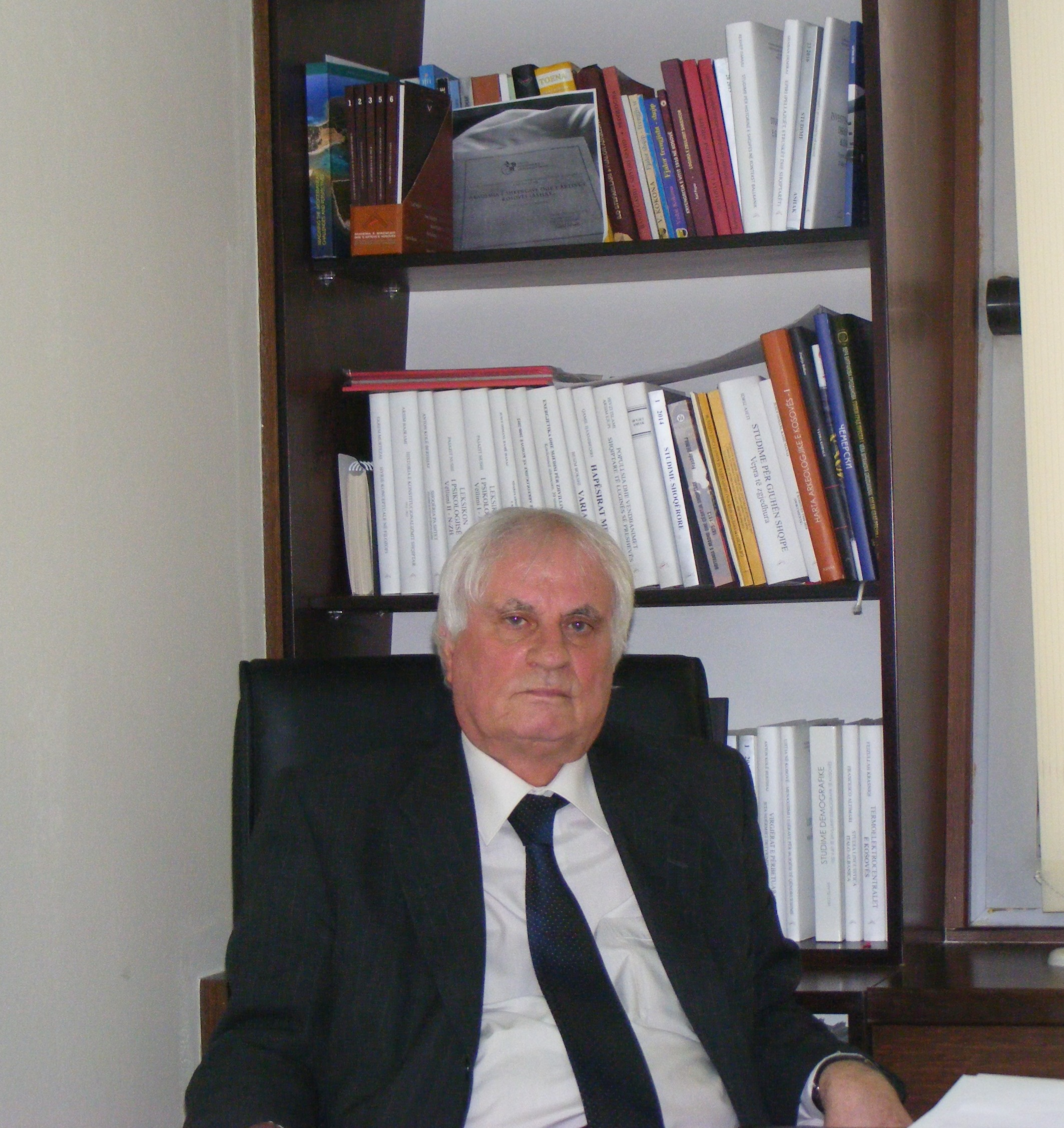 Hivzi Islami, Anëtar i Akademisë së Shkecave, Arteve të Kosovës